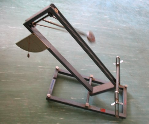 Photographie d'un pendule de Mach (photographie personnelle) Catégorie:Image_de_Physique